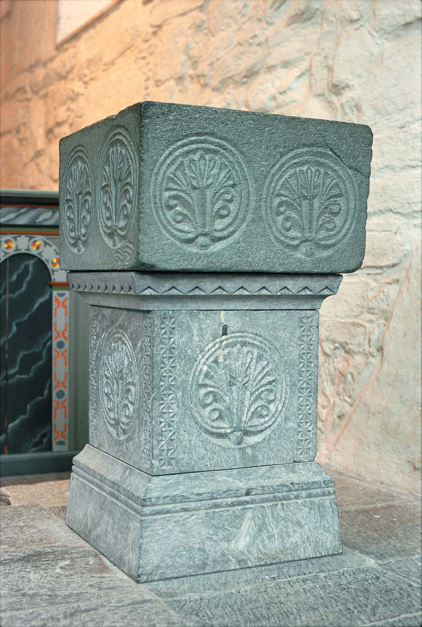 Døpefonten i Utstein klosterkirke